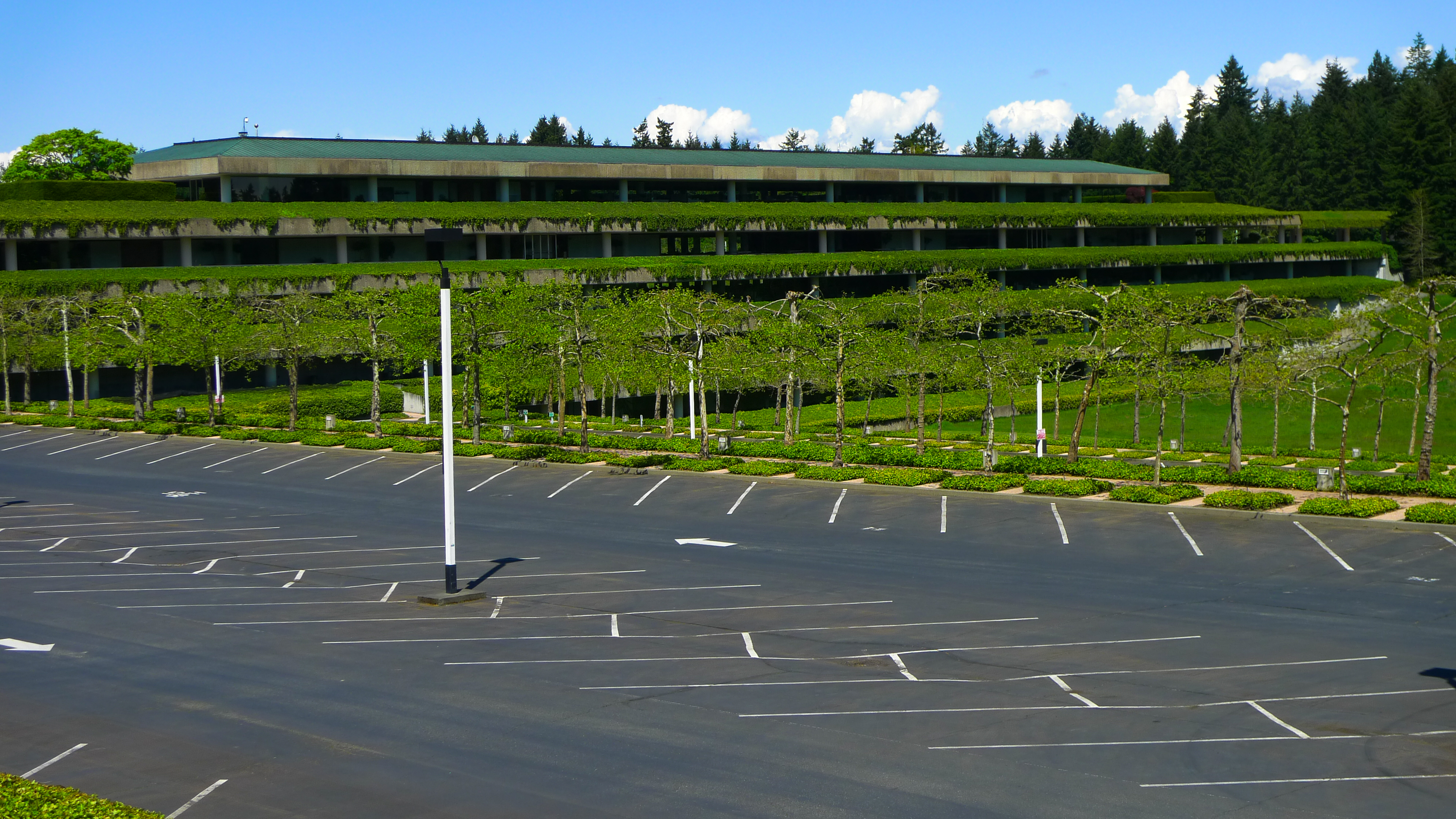 Weyerhaeuser HQ